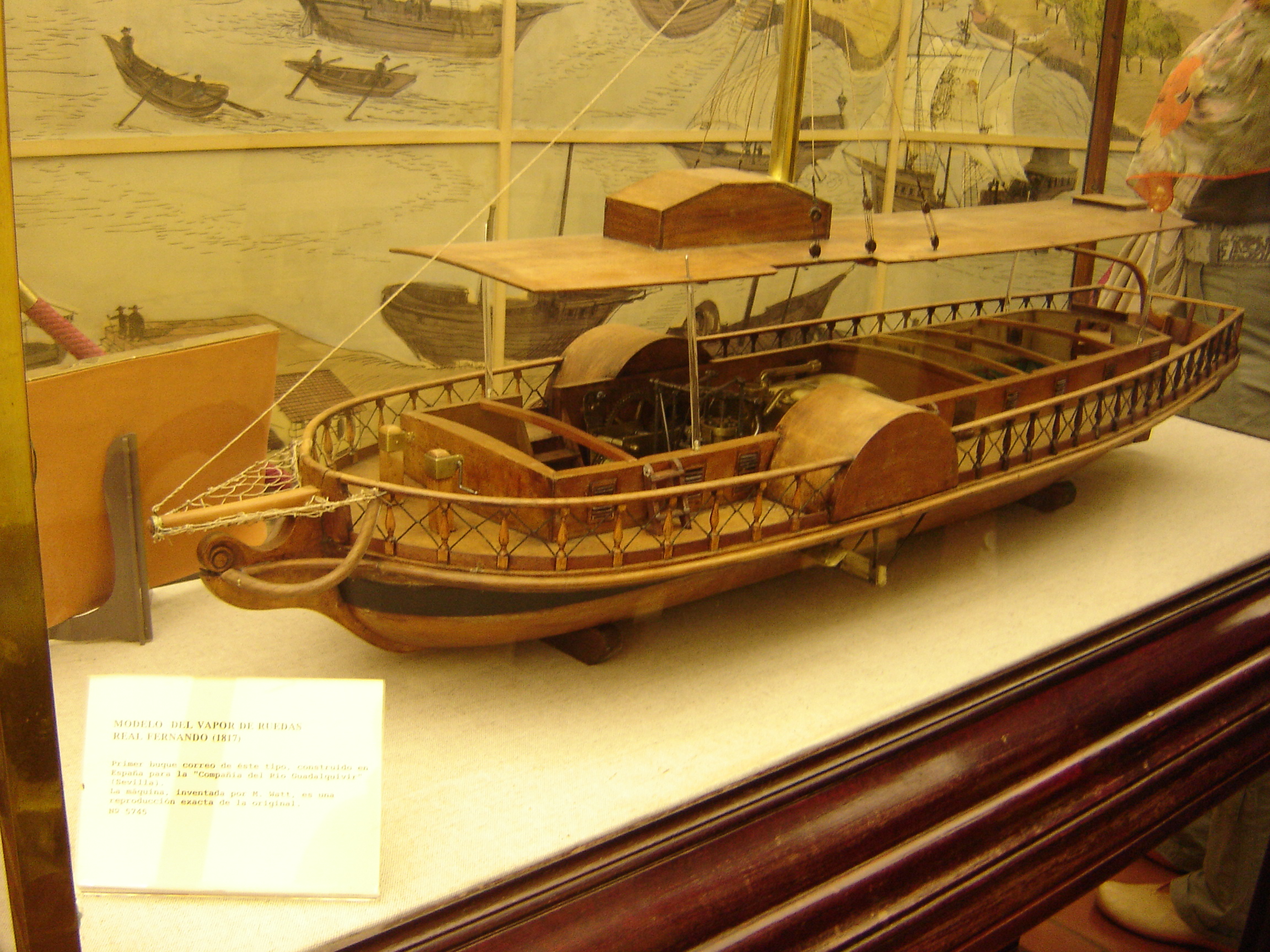 Vapor de ruedas "Real Fernando" (Museo Naval, Sevilla, España).